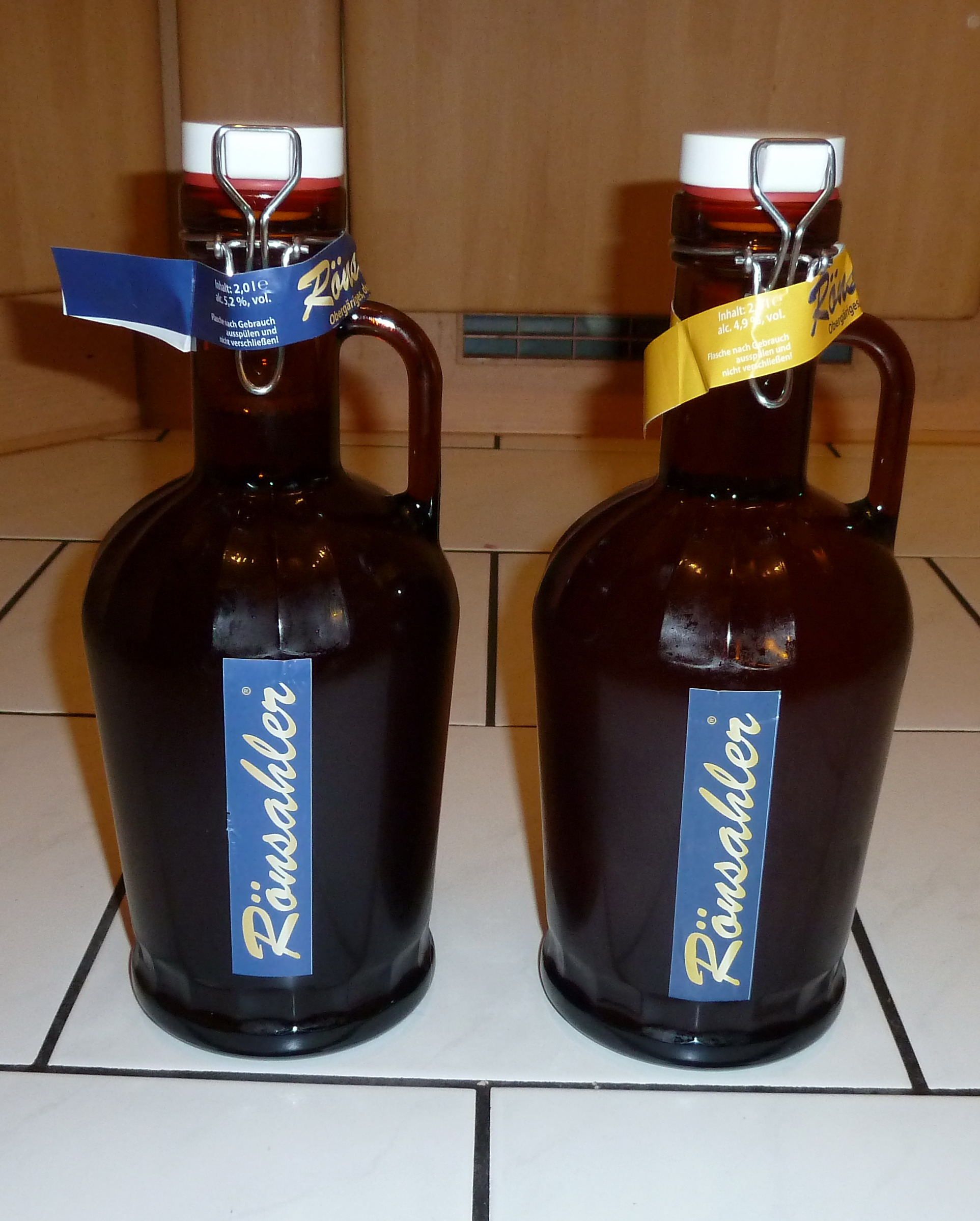 2 Liter Biersiphon des Rönsahler Landbiers, Sorten Hell und Dunkel